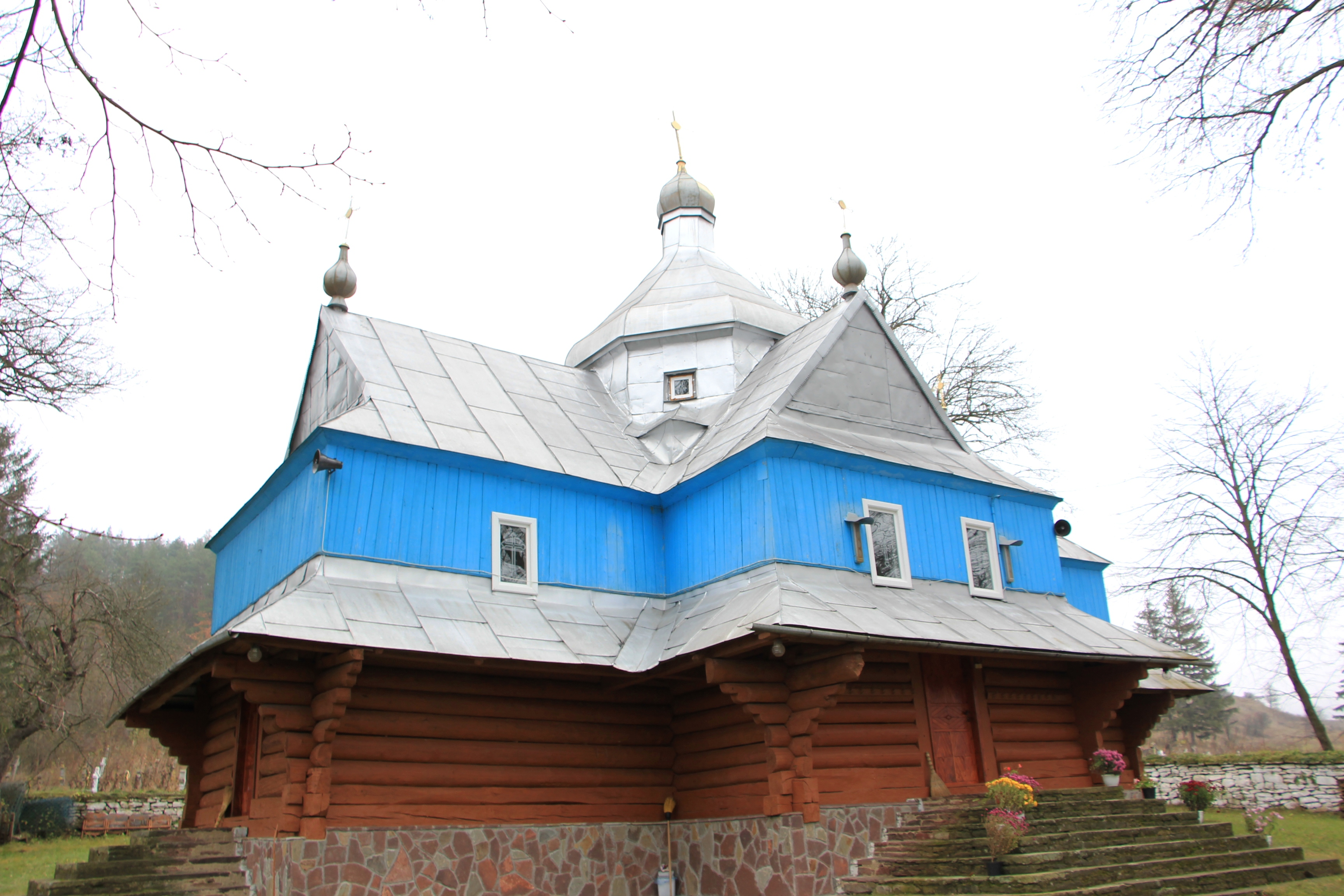 Пам'ятник в селі Губин